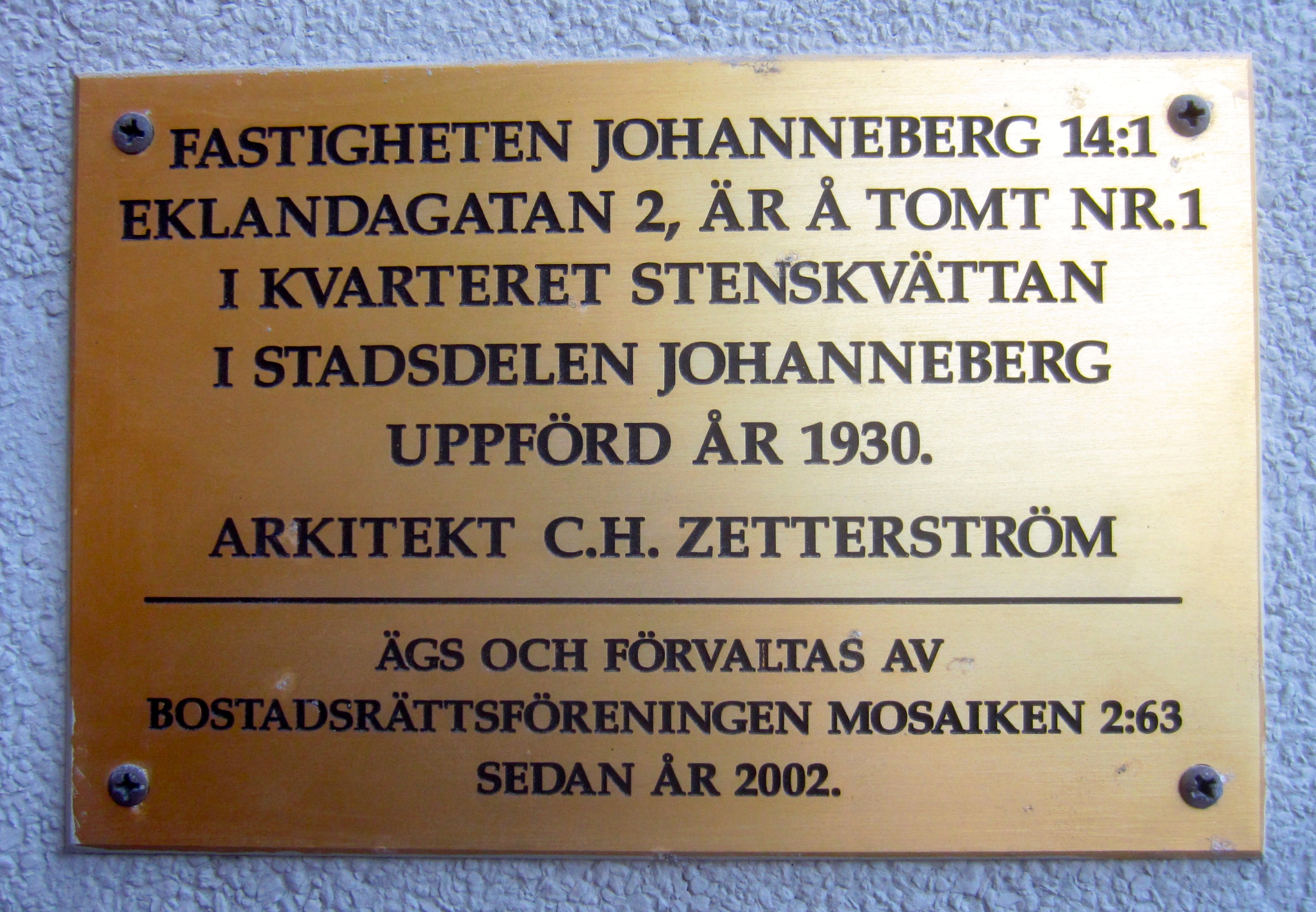 Plakett vid porten till Eklandagatan 2 i Göteborg.